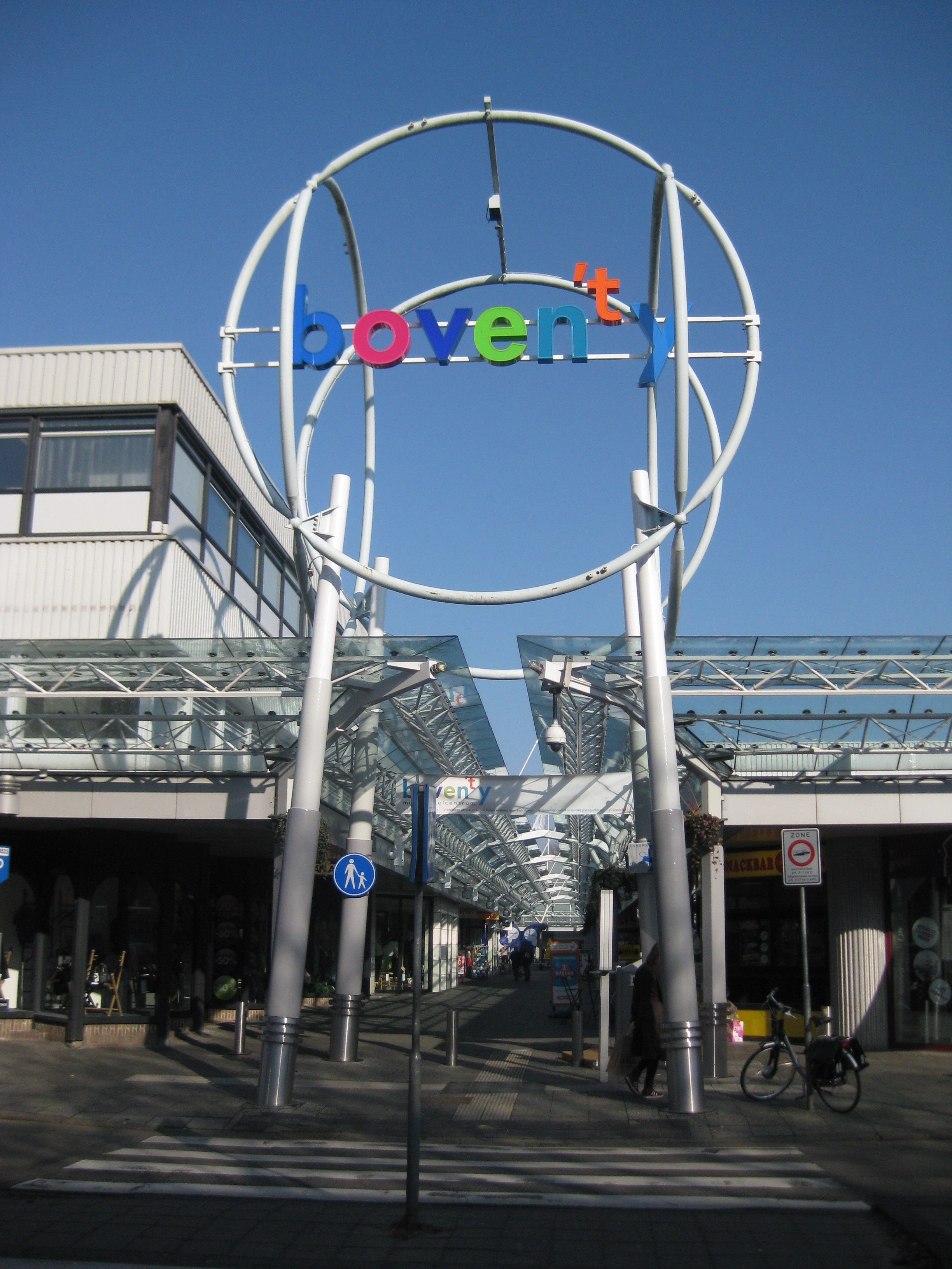 Nieuw logo Winkelcentrum Boven 't Y, Amsterdam-Noord